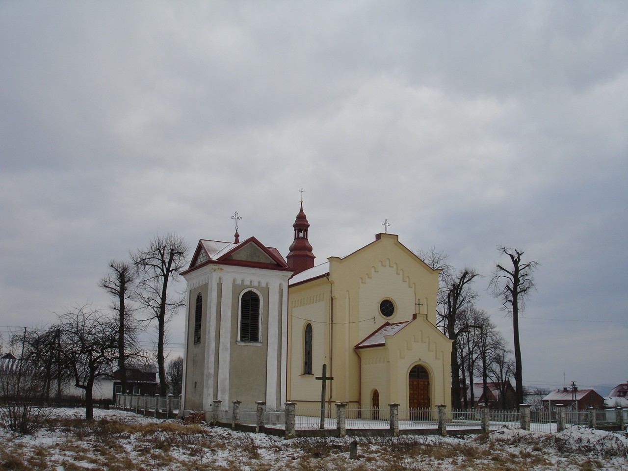 Kościół w Bachórzu